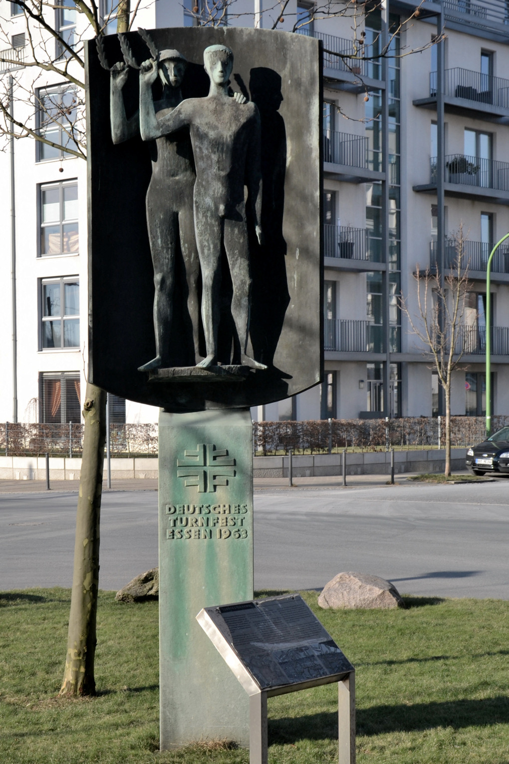 Turnfestdenkmal im Essener-Rüttenscheid, zum Gedenken an das Deutsche Turnfest Essen 1963; unter Denkmalschutz